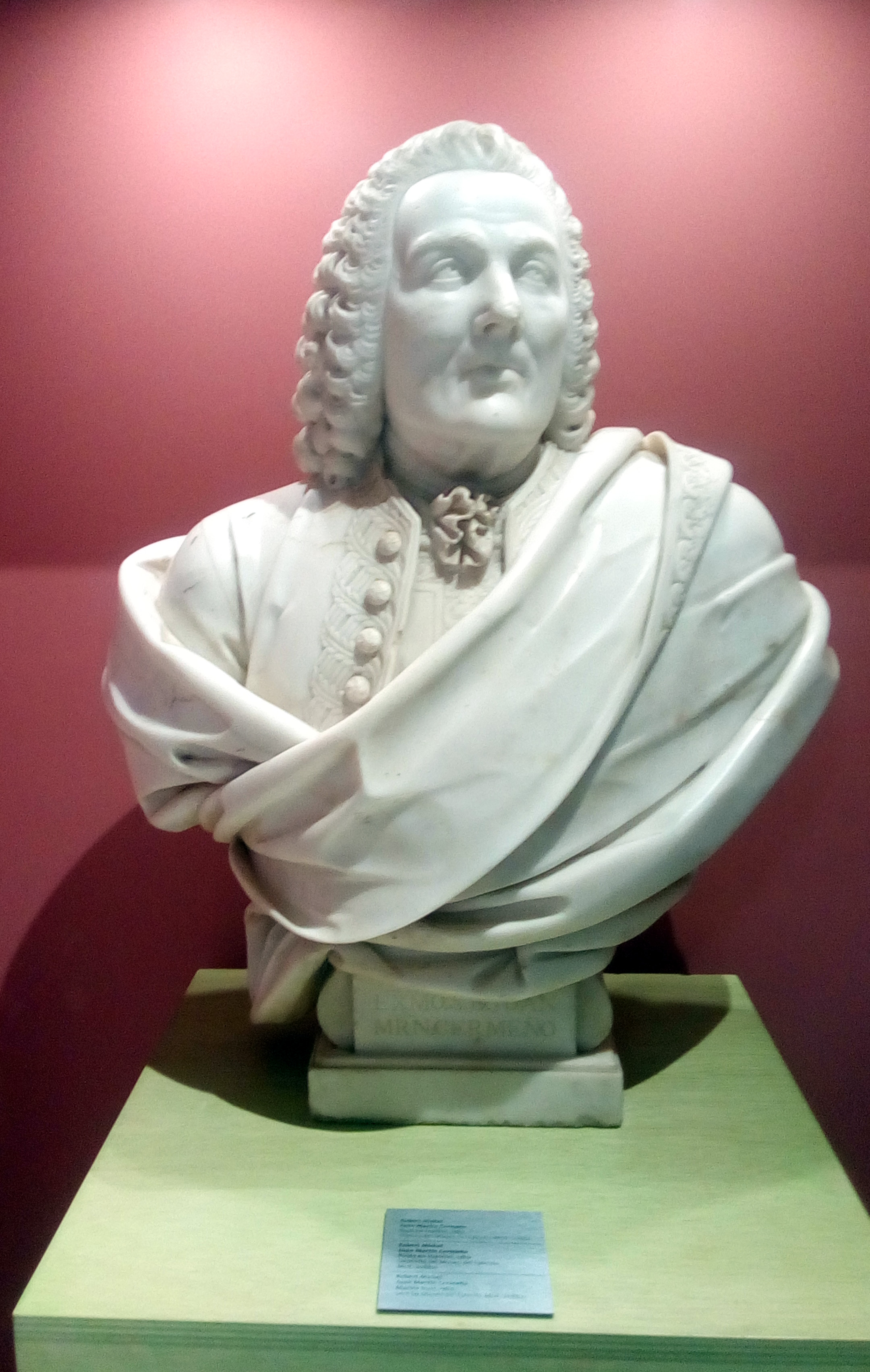 Busto de Juan Martín Cermeño, de Robert Michel (1780).